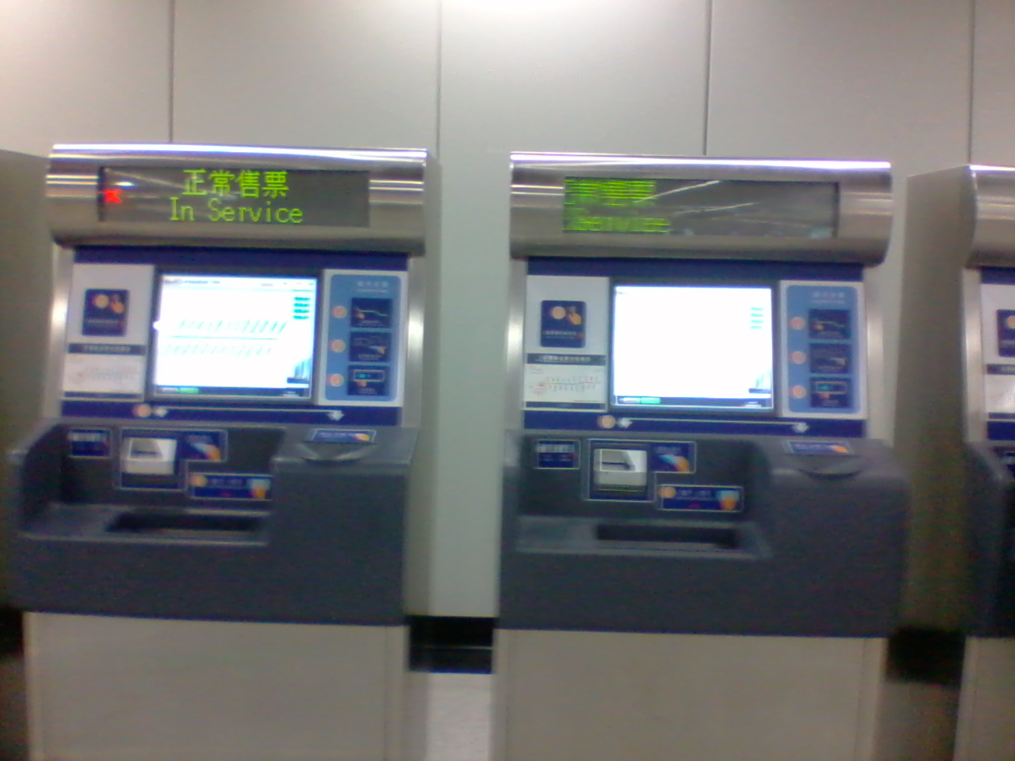 苏州地铁自动售票机，Huhaoyu321摄影于2012年4月28日